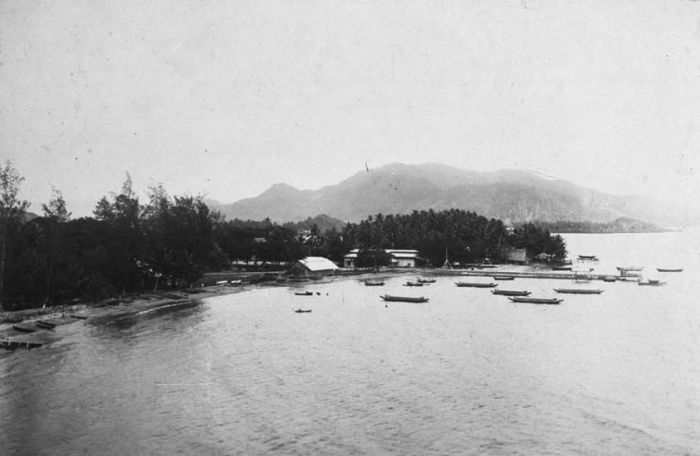 Foto. De haven van Siboga